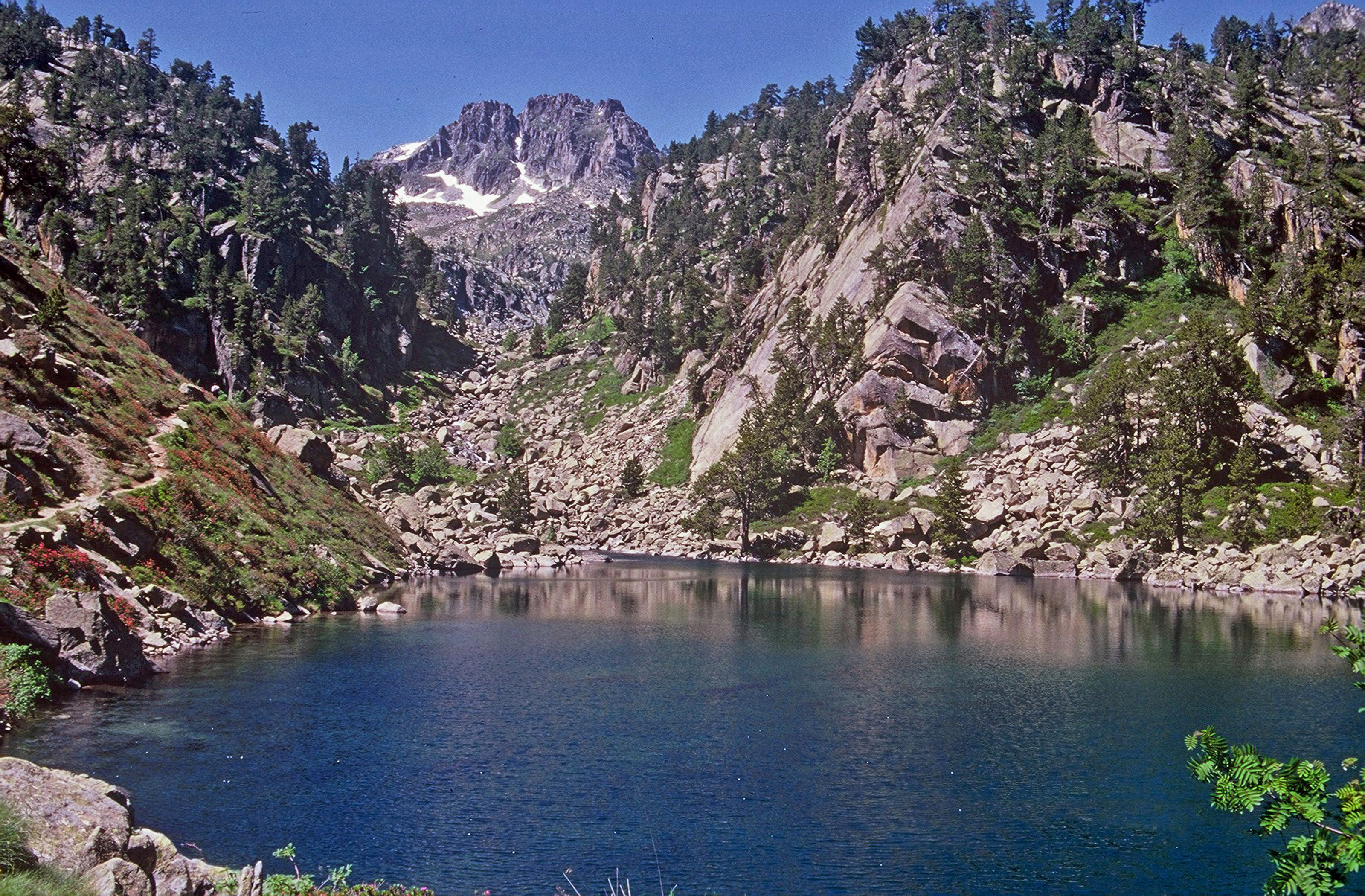 El Gerber de Baix a l'Alt Àneu amb el Puis de Gerber al fons CODI ES510146